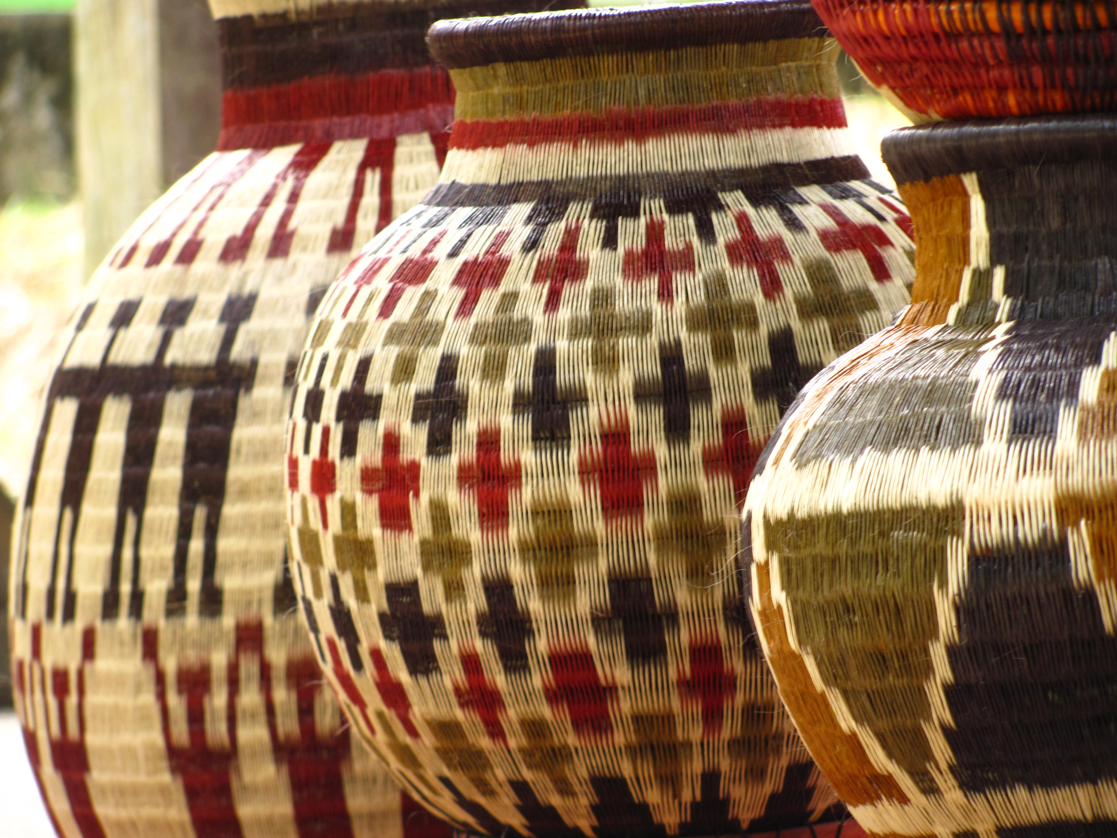 Jarrones en werregue hechos a mano con materiales naturales por las mujeres de la Comunidad Wuanaan de Bahía Málaga, Colombia.